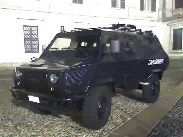 Iveco VM 90P Carabinieri davanti a Palazzo Reale, Milano.